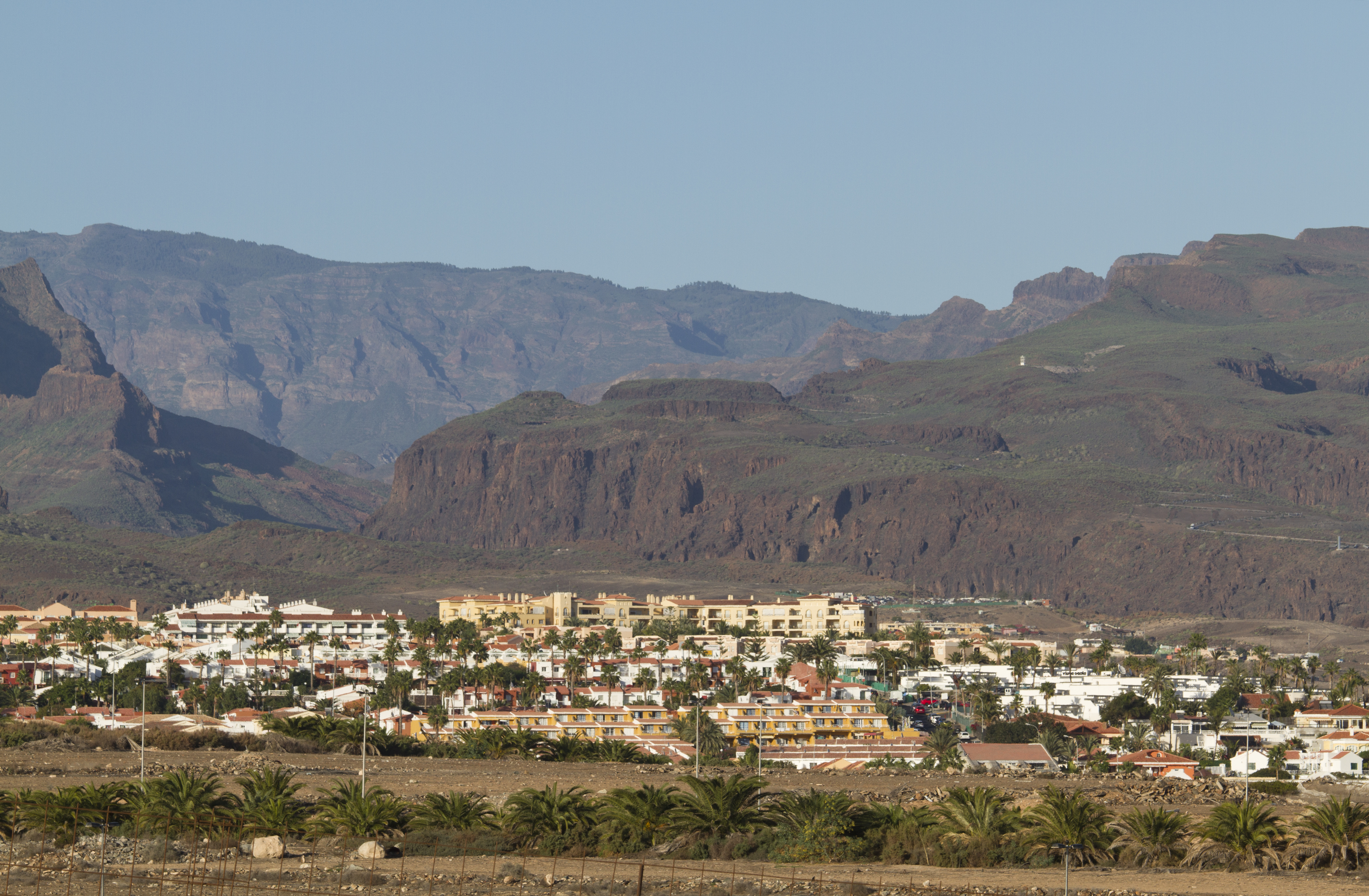 Sonneland